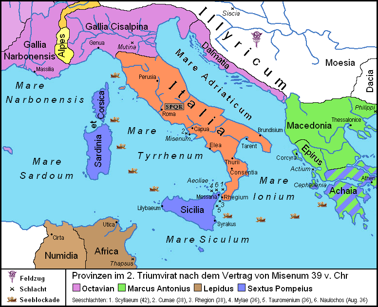 Karte Italiens und Siziliens nach dem Vertrag von Misenum 39 v. Chr.